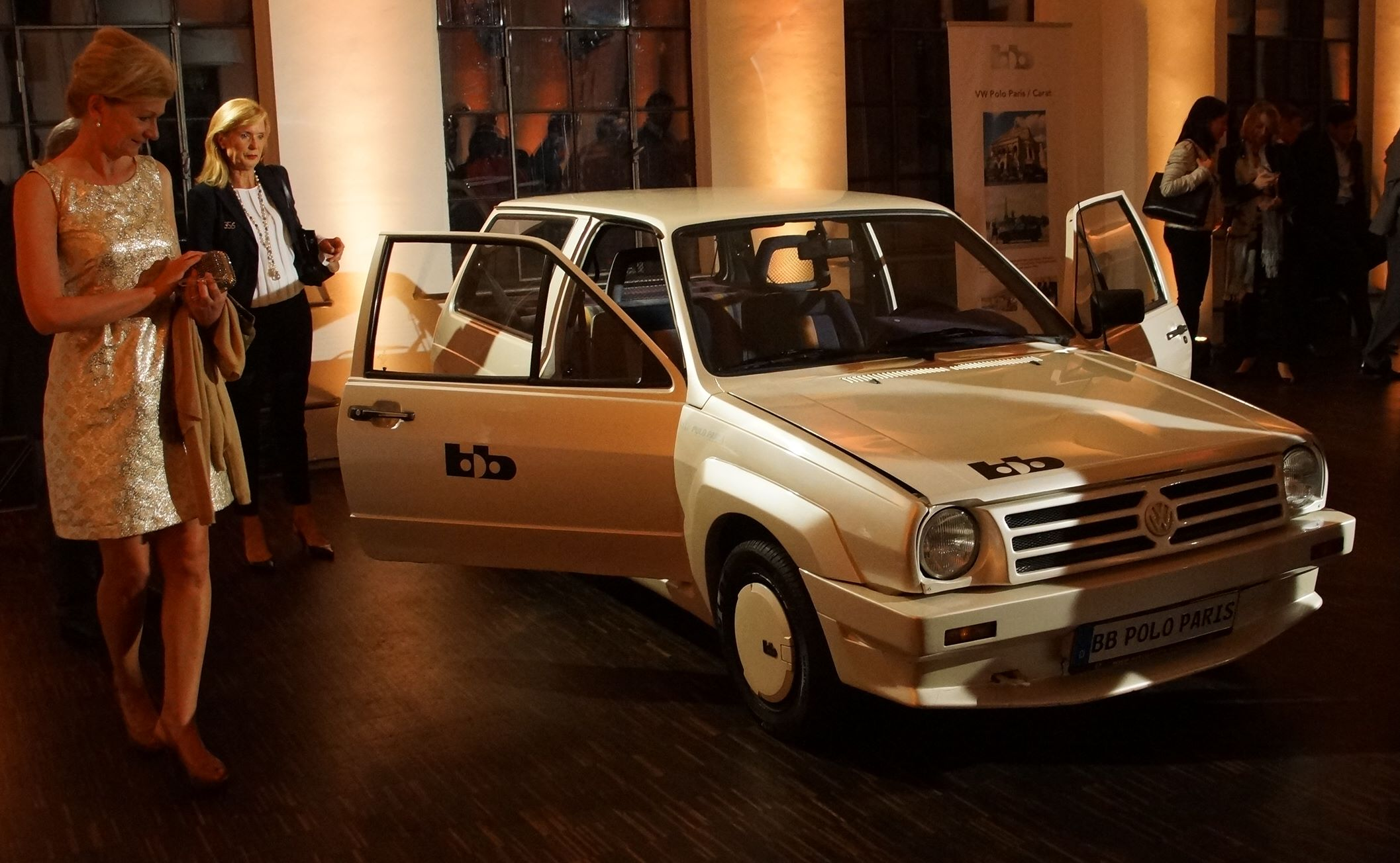 bb VW Polo Paris / Carat bei der Enthüllung des bb Moonracer in der Klassikstadt Frankfurt am 20.-21. September 2014